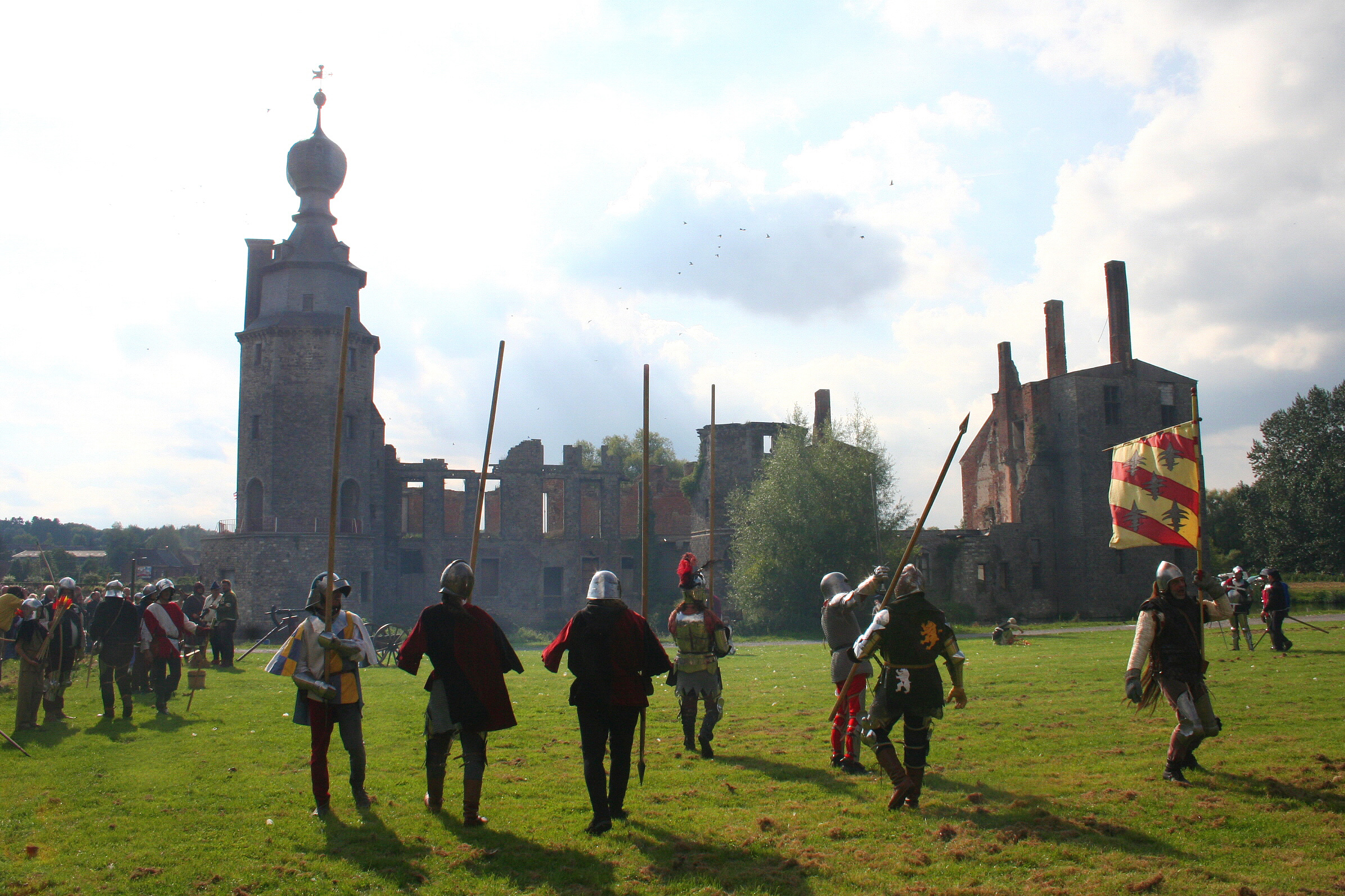 Havré (Belgique), reconstitution historique de la prise du château des princes de Croÿ en 1521.